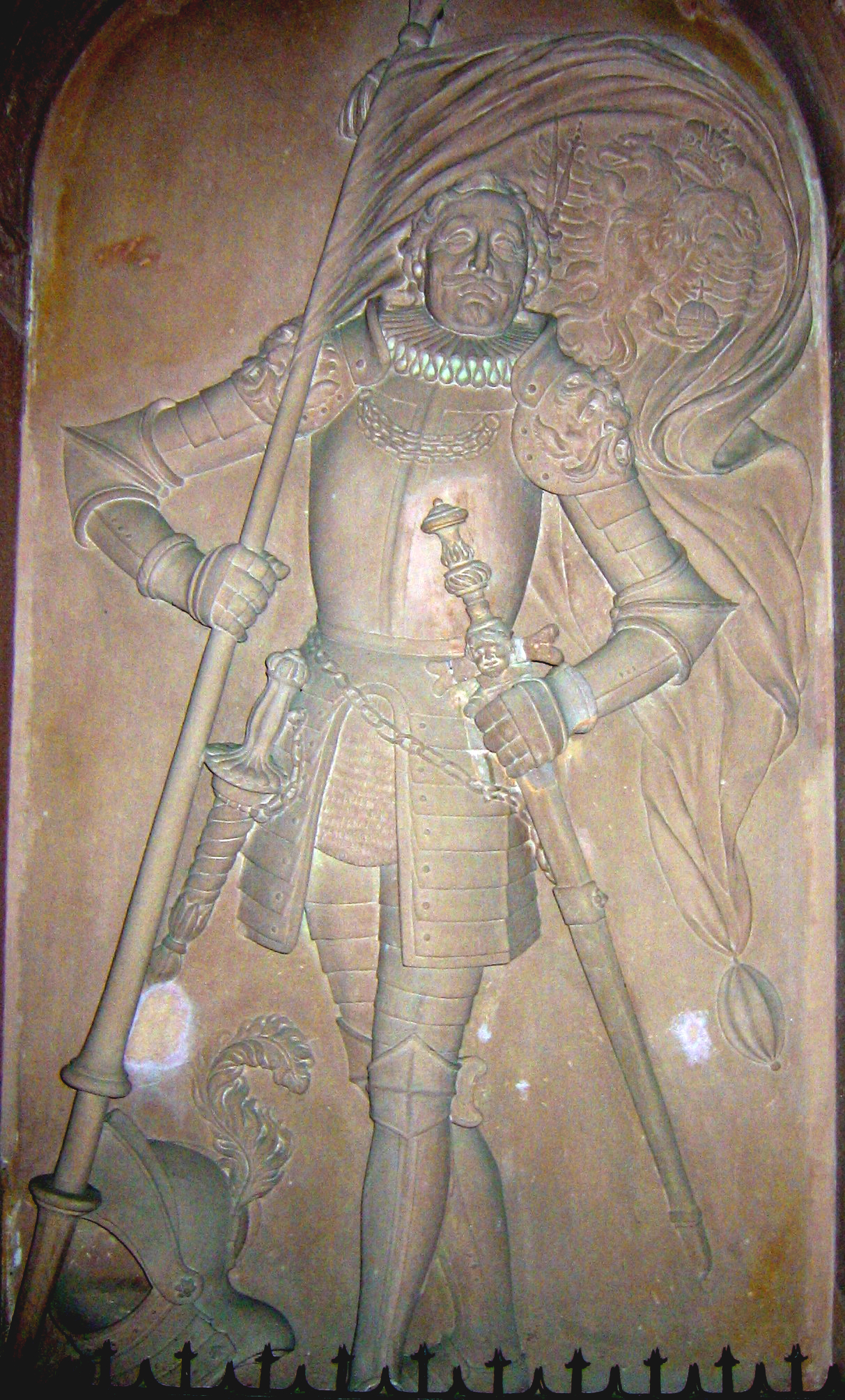 Bertold IV. (ca. 1125-1186), Relief im Chor des Freiburger Münsters